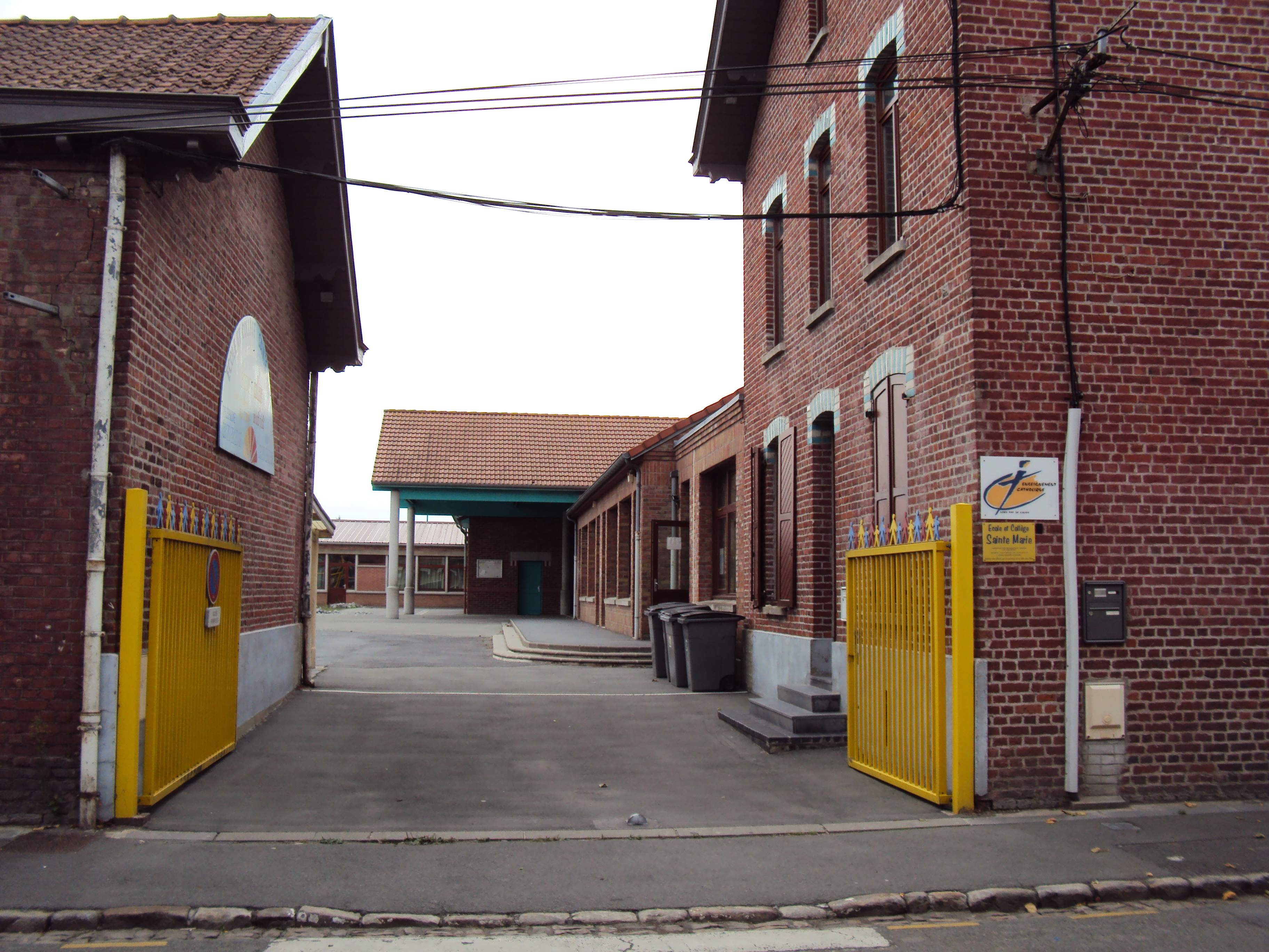 École & Collège Sainte-Marie1 à Pérenchies (Nord).